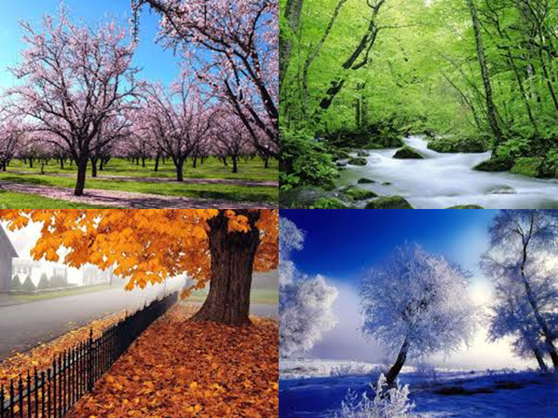 چهار فصل زیبای خداوند